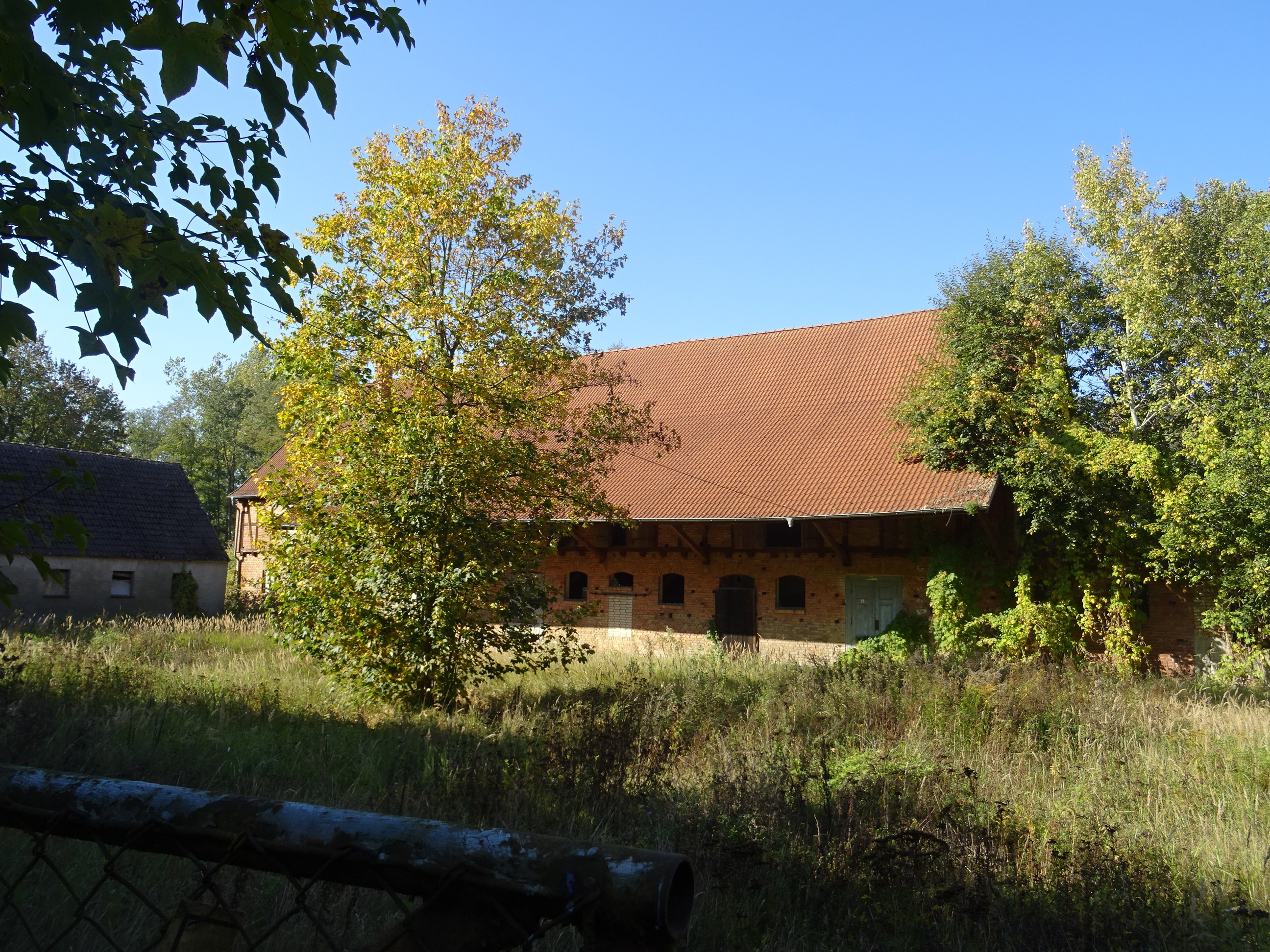 Ziethenmühle, nördlich von Frauenhagen, Stadt Angermünde, denkmalgeschützte ehemalige Mühle, jetzt Ruine, denkmalgeschützt, Hof